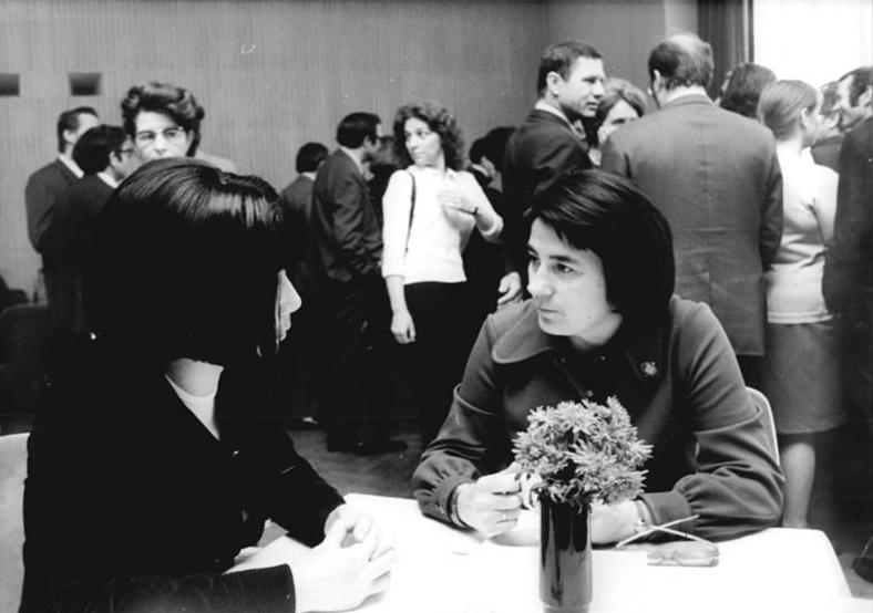 ADN-ZB Katscherowski 15.11.1973 Berlin: VII. Schriftstellerkongreß In einer Beratungspause des zweiten Kongreßtages: Christa Wolf (r.), die dem Präsidium des Schriftstellerkongresses angehört, im Gespräch mit Irmtraut Morgner.